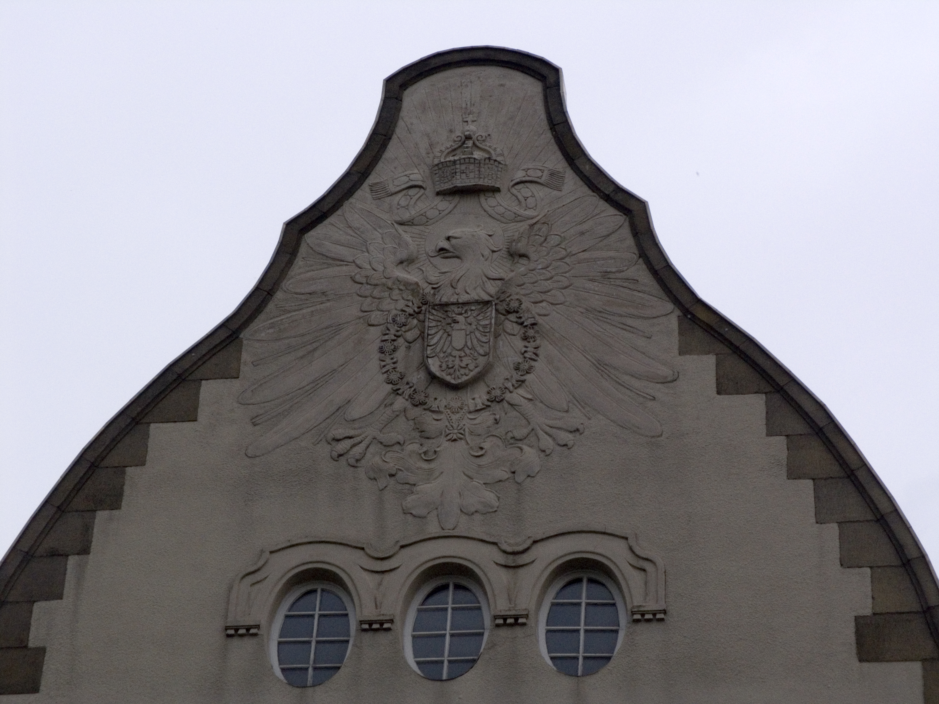 Северный Рейн - Вестфалия, Эссен – ратуша района Край